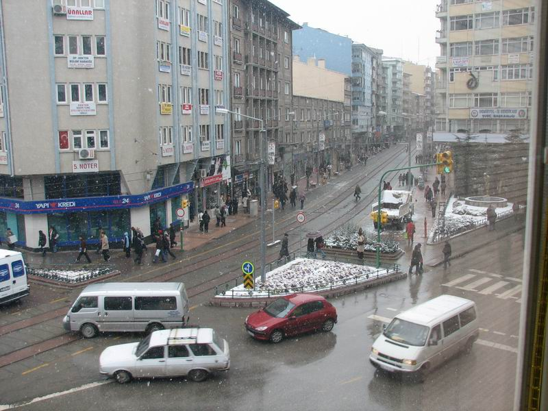 Eskişehir tramvay yolu